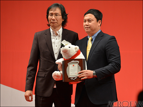 제20회 코카-콜라 체육대상 시상식